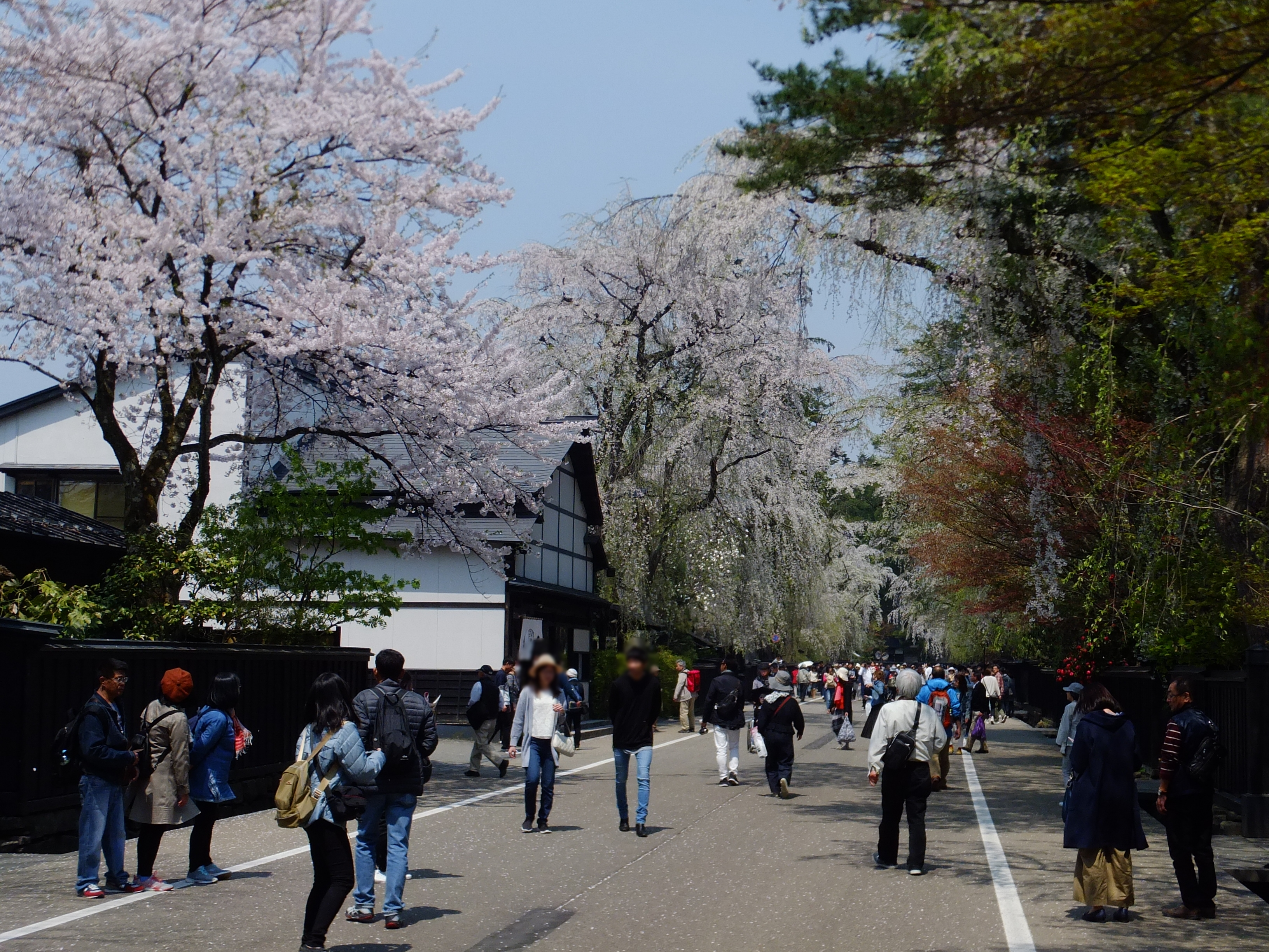 満開の桜と観光客でにぎわう武家屋敷通り(秋田県仙北市 角館)